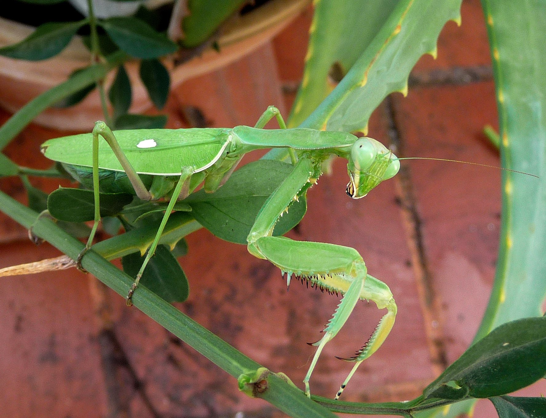 Sphodromantis viridis. female. Mantidae